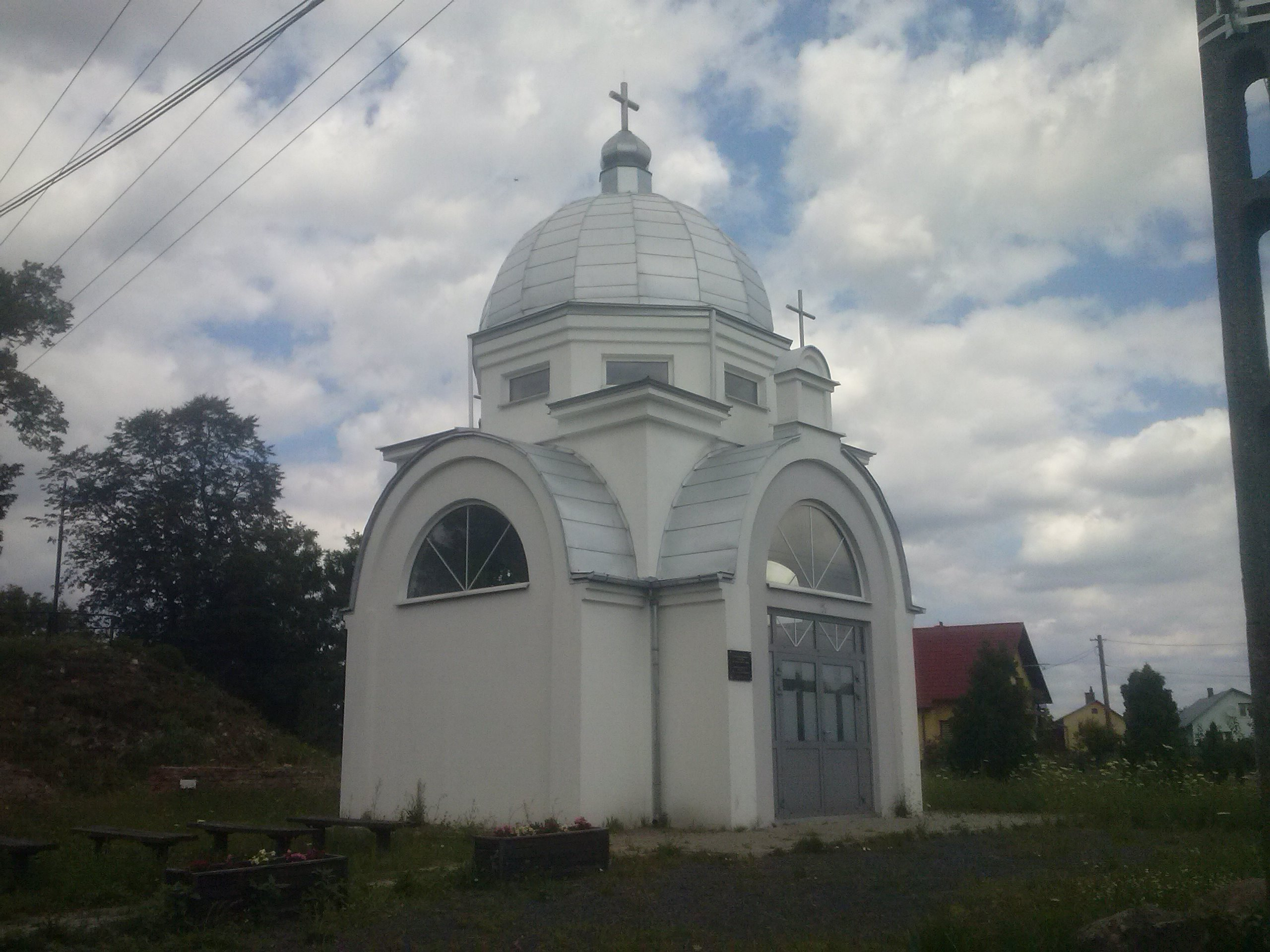 Piskorowice - kaplica grekokatolicka pw. św. Jana Ewangelisty na dawnym placu cerkiewnym